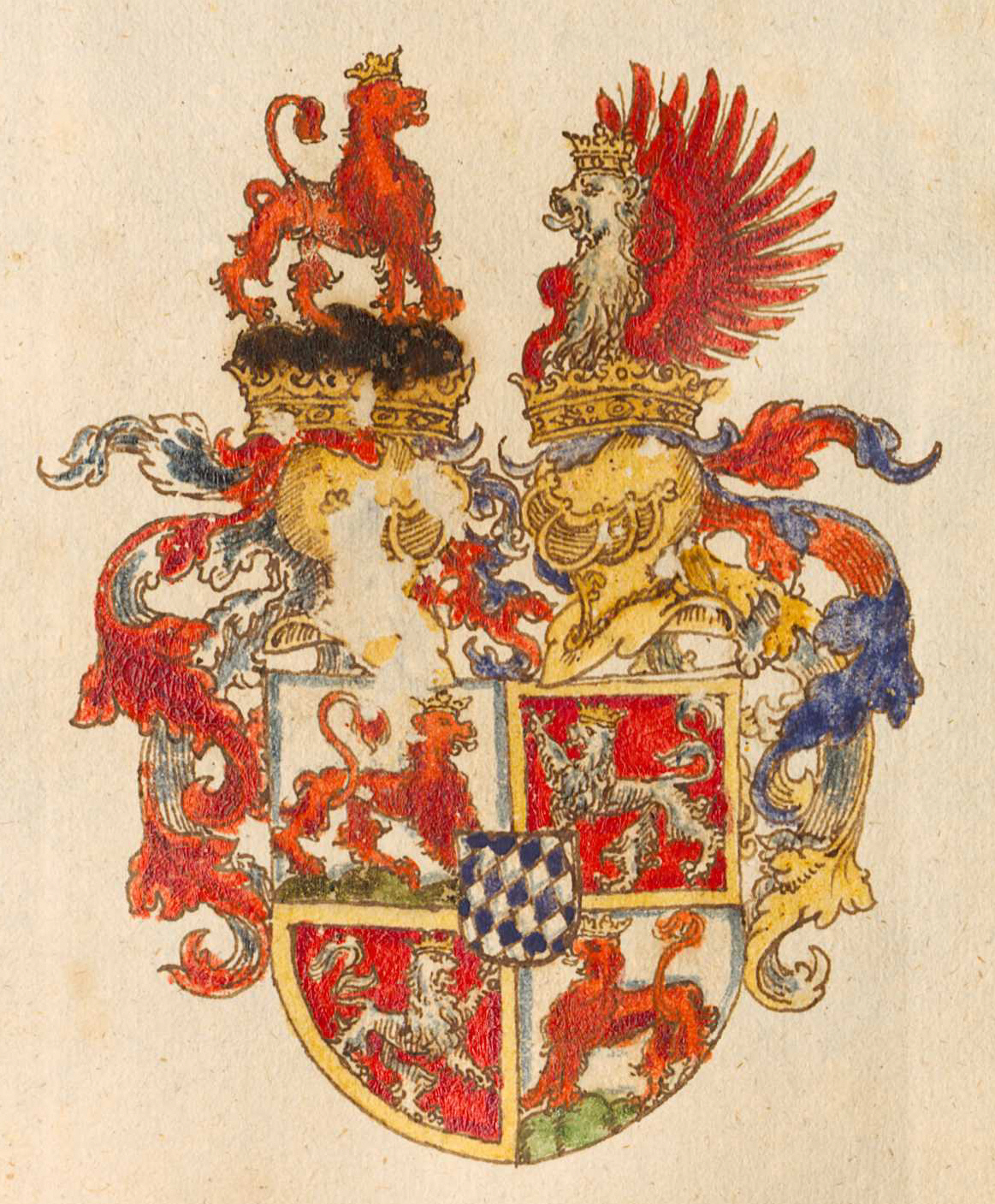 Wappen Ludwig Graf von Löwenstein und Breuberg (Ludwig III. von Löwenstein)